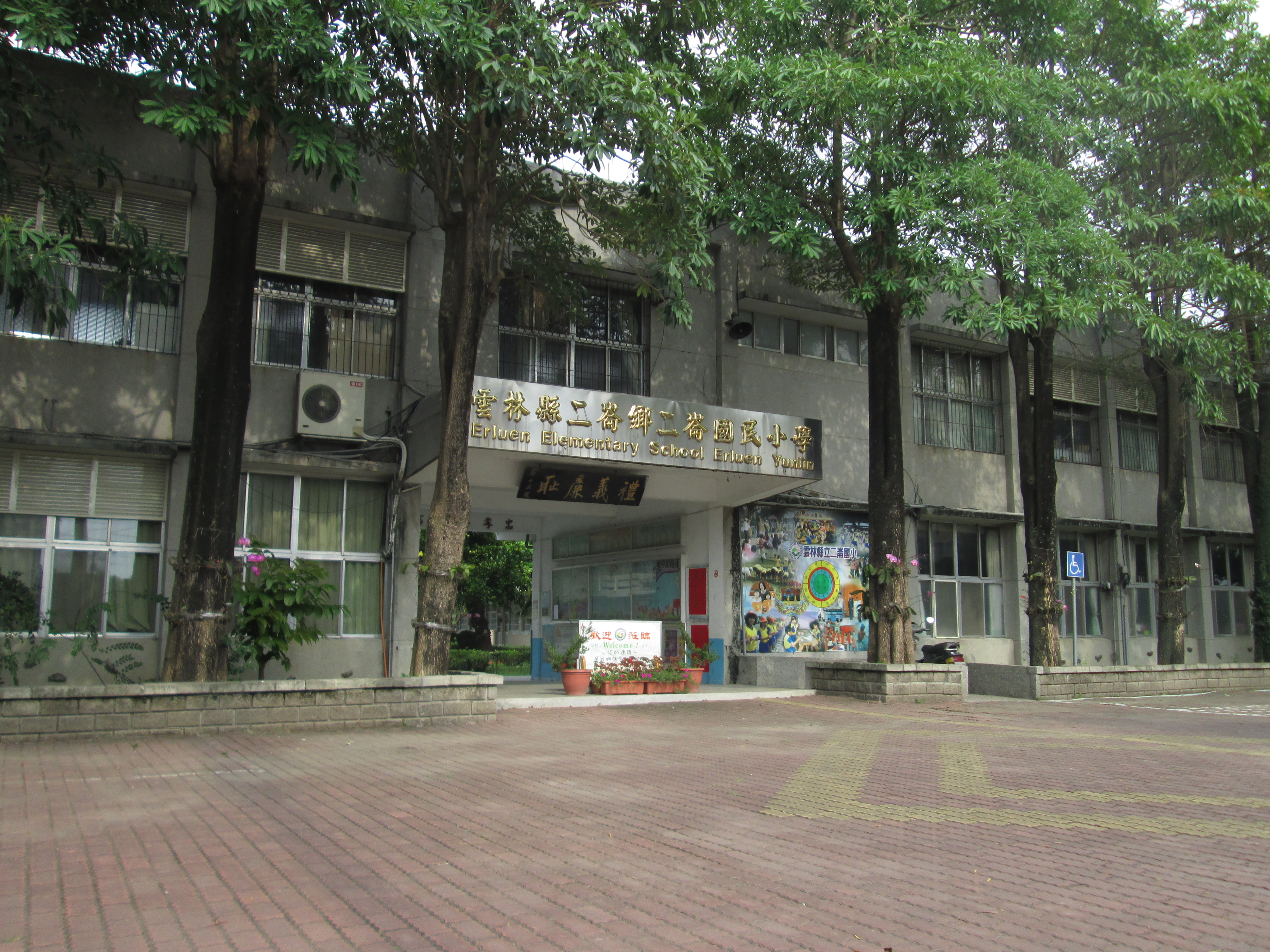 雲林縣二崙鄉 二崙國小